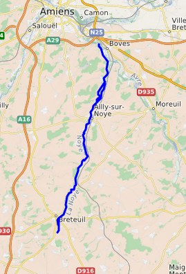 carte réalisée sur umap This map may be incomplete, and may contain errors. Don't rely solely on it for navigation.